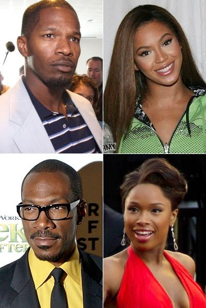 Elenco do filme Dreamgirls (Jamie Foxx, Beyoncé Knowles, Eddie Murphy e Jennifer Hudson).